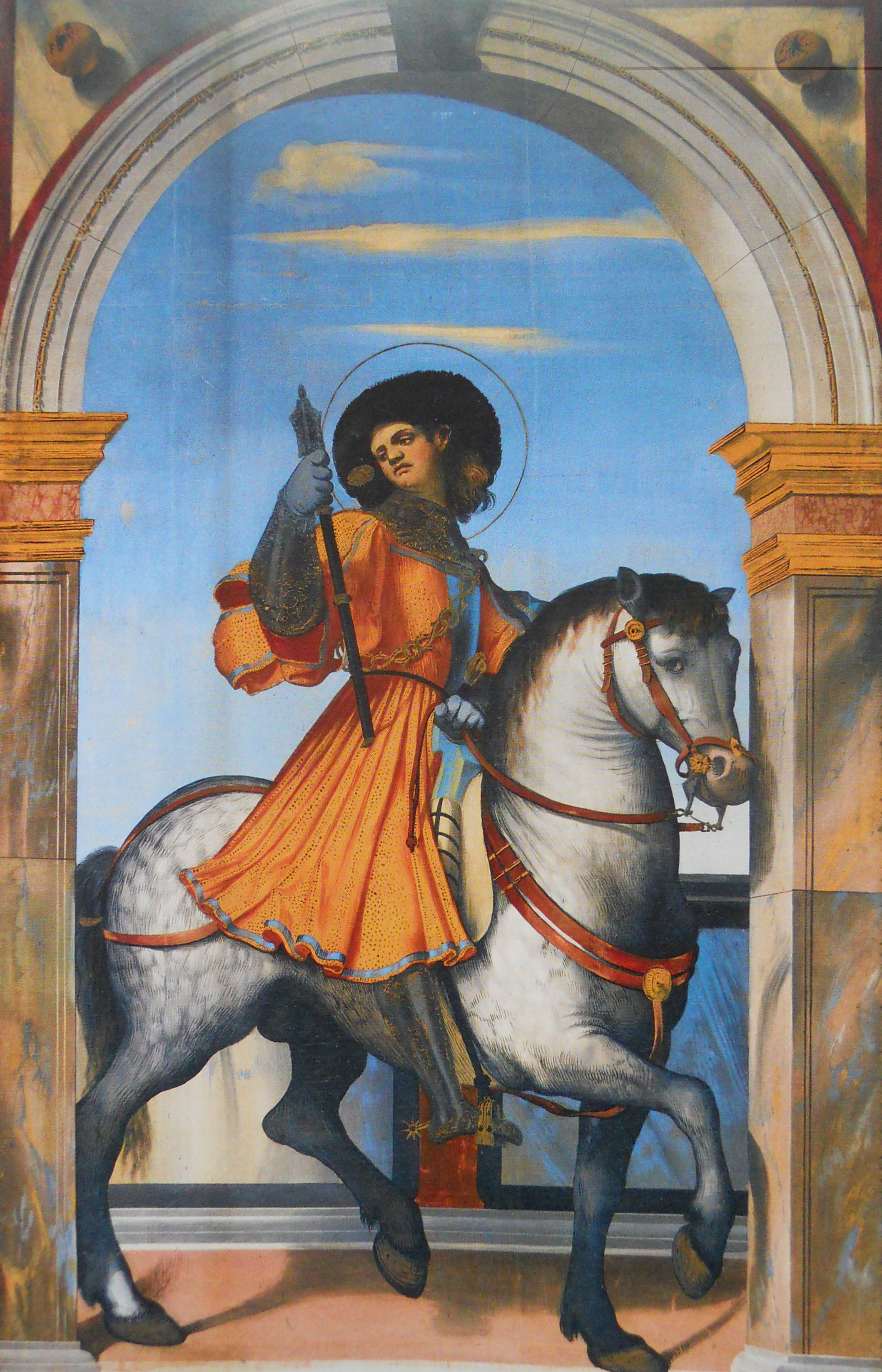 San Giovita a cavallo (Moretto)